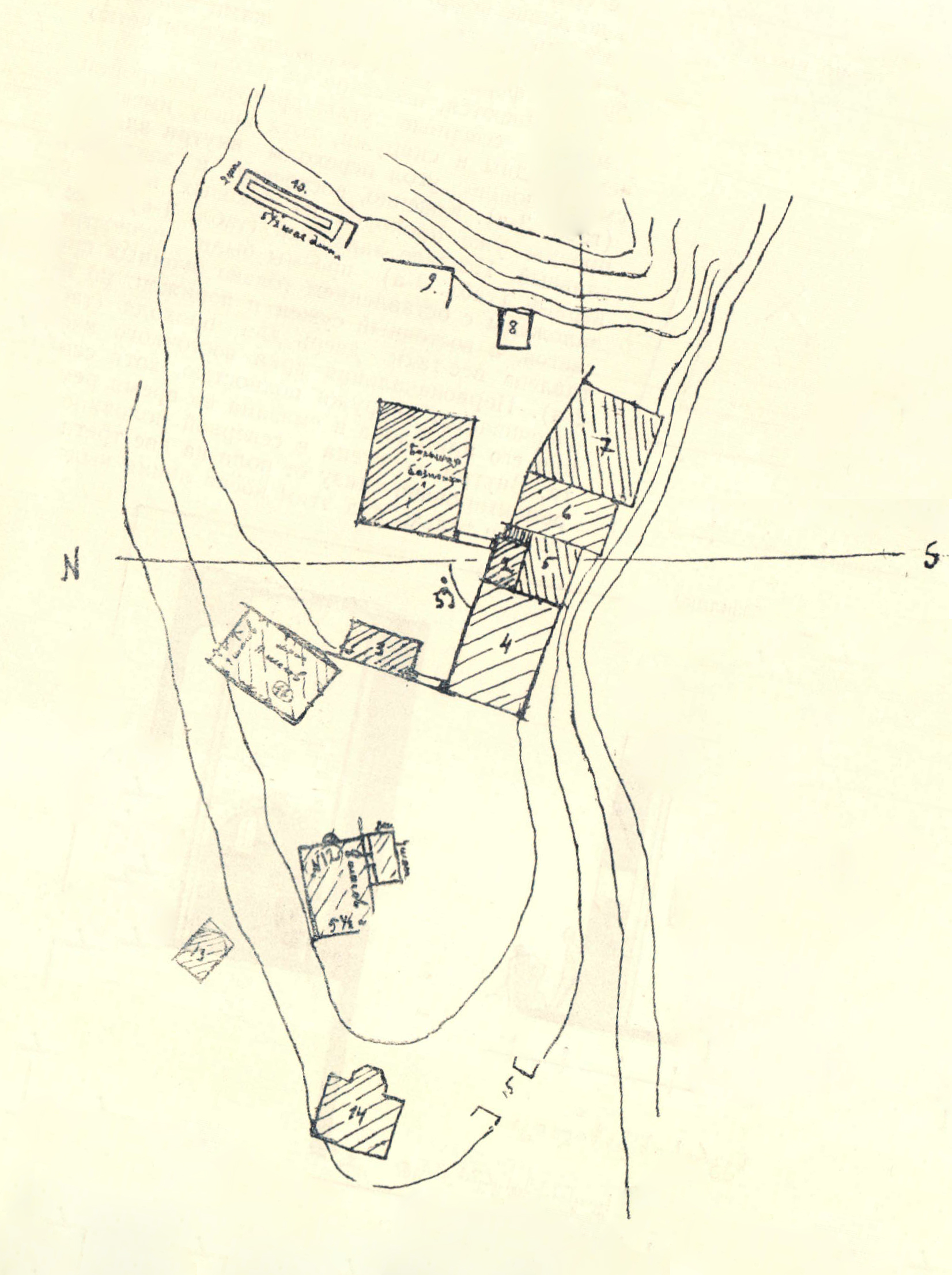 ნეკრესის მონასტრის გეგმა